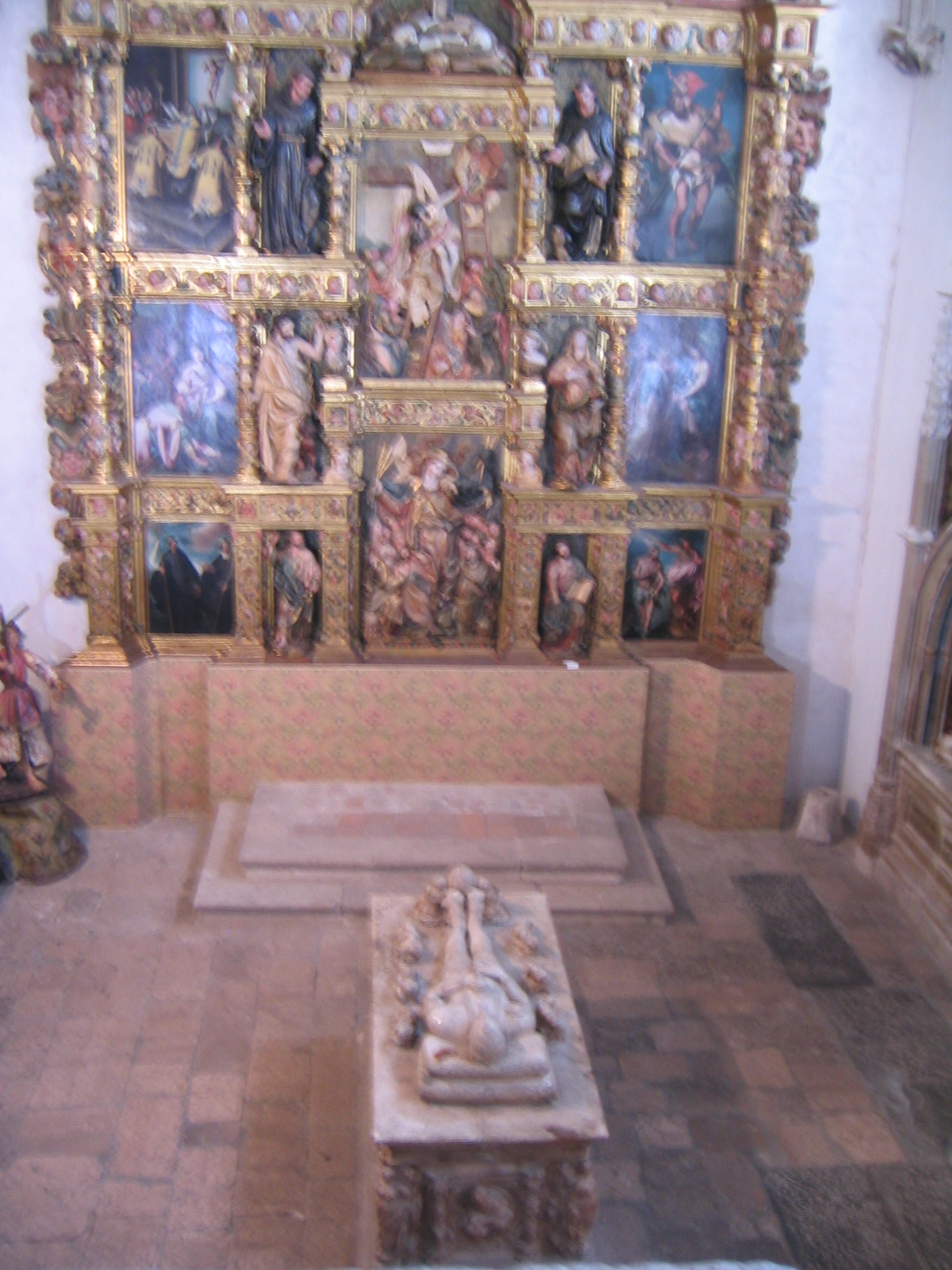 Iglesia museo de San Antolín, capilla de los Alderete en Tordesillas (Valladolid) España.